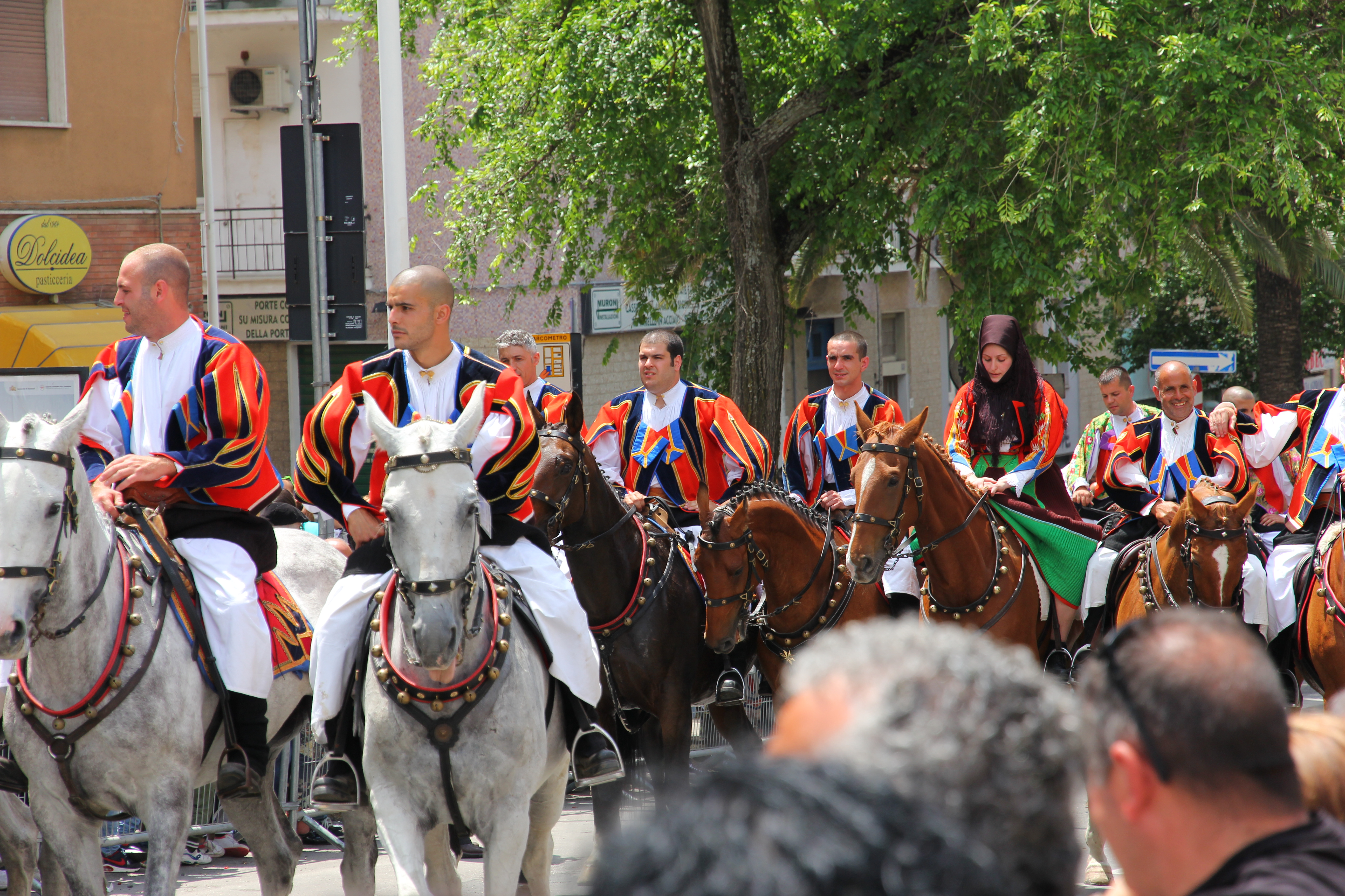 Costume tradizionale